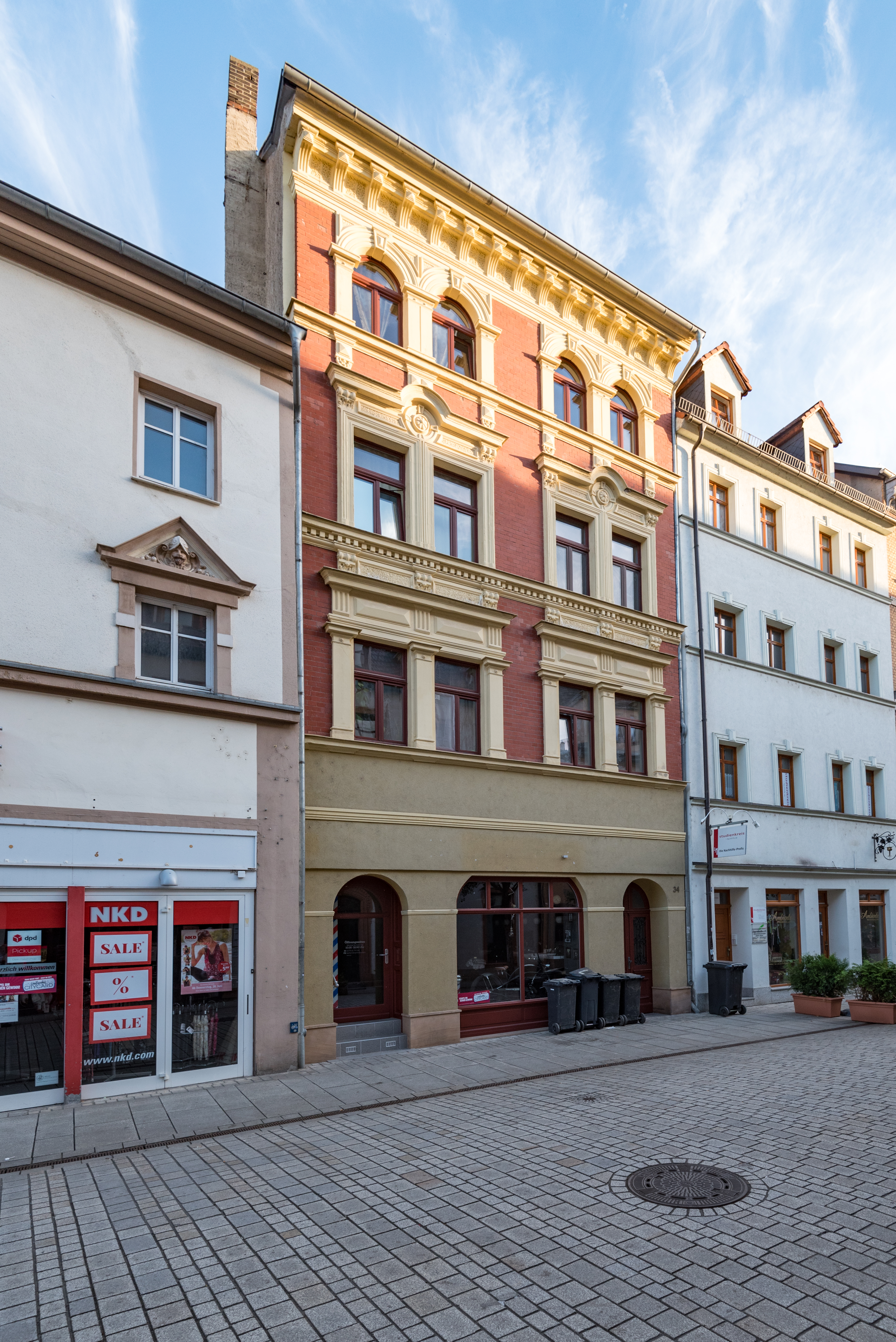 Weißenfels, Jüdenstraße 34